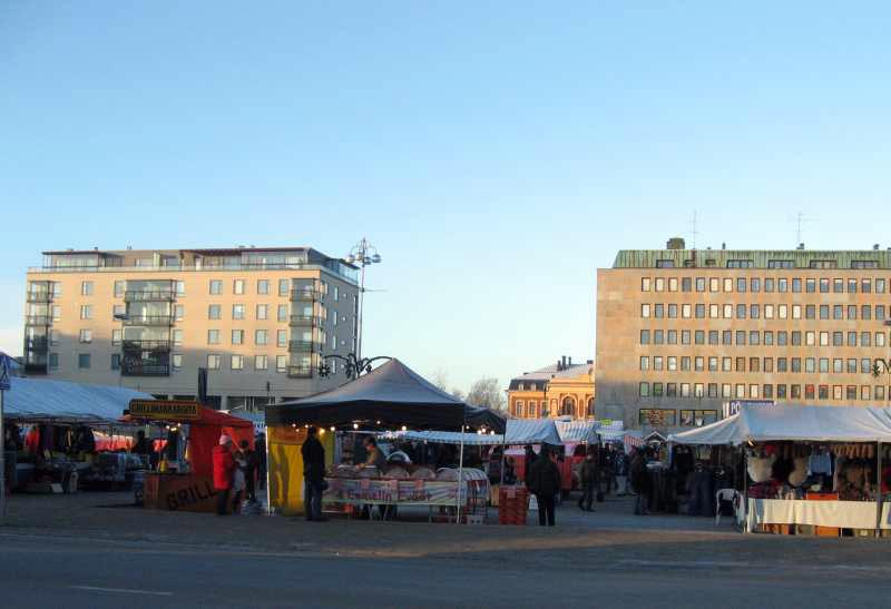 Joensuu market place